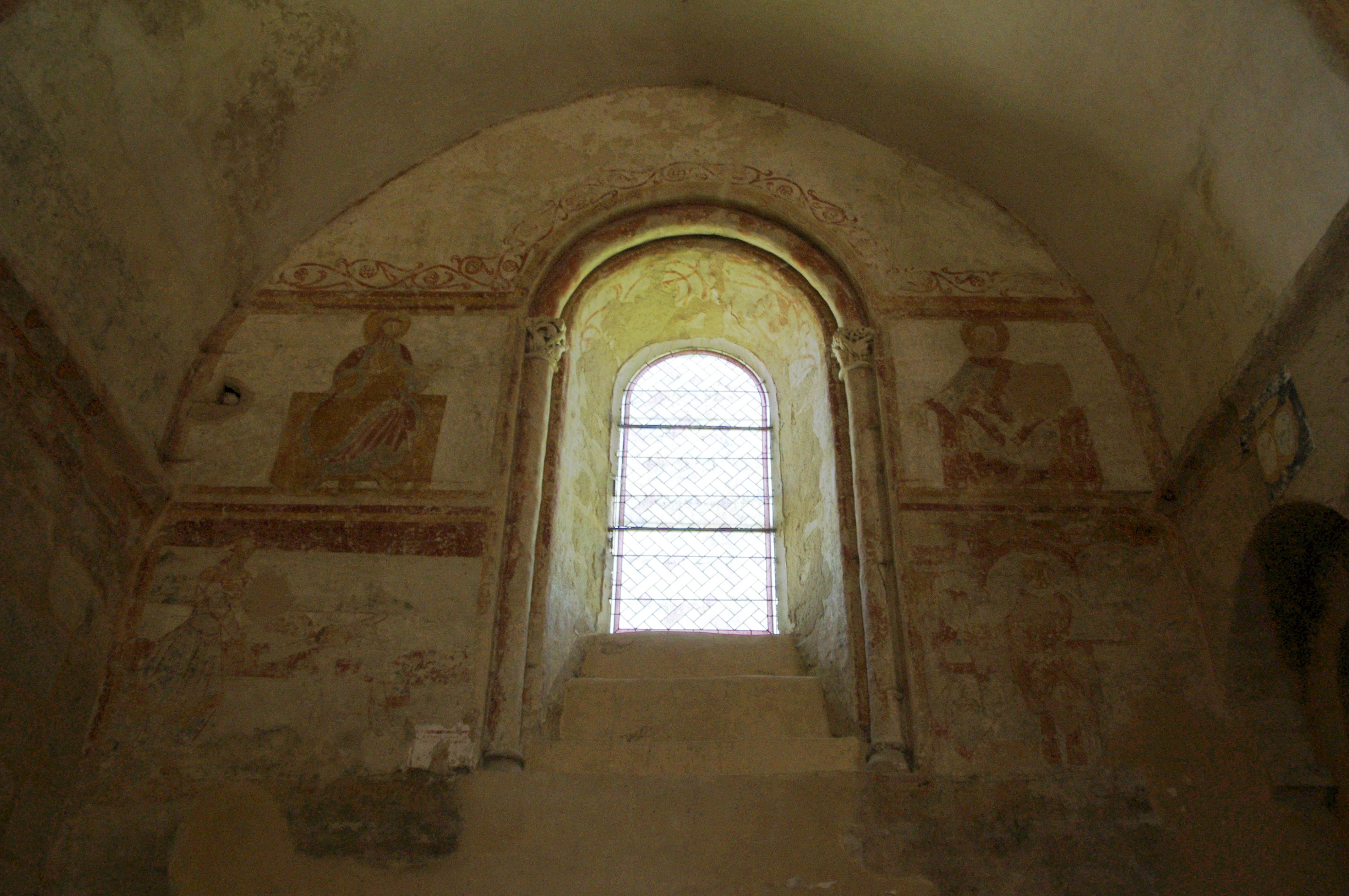 Fresque du XIIe siècle dans l'église Saint Eutrope des Salles-Lavauguyon, Haute-Vienne, France. Mur nord de la nef. Thème : Le martyre de Sainte Valérie ; à gauche du vitrail : la décapitation de Sainte Valérie et à droite du vitrail Sainte Valérie apporte sa tête à Saint Martial.